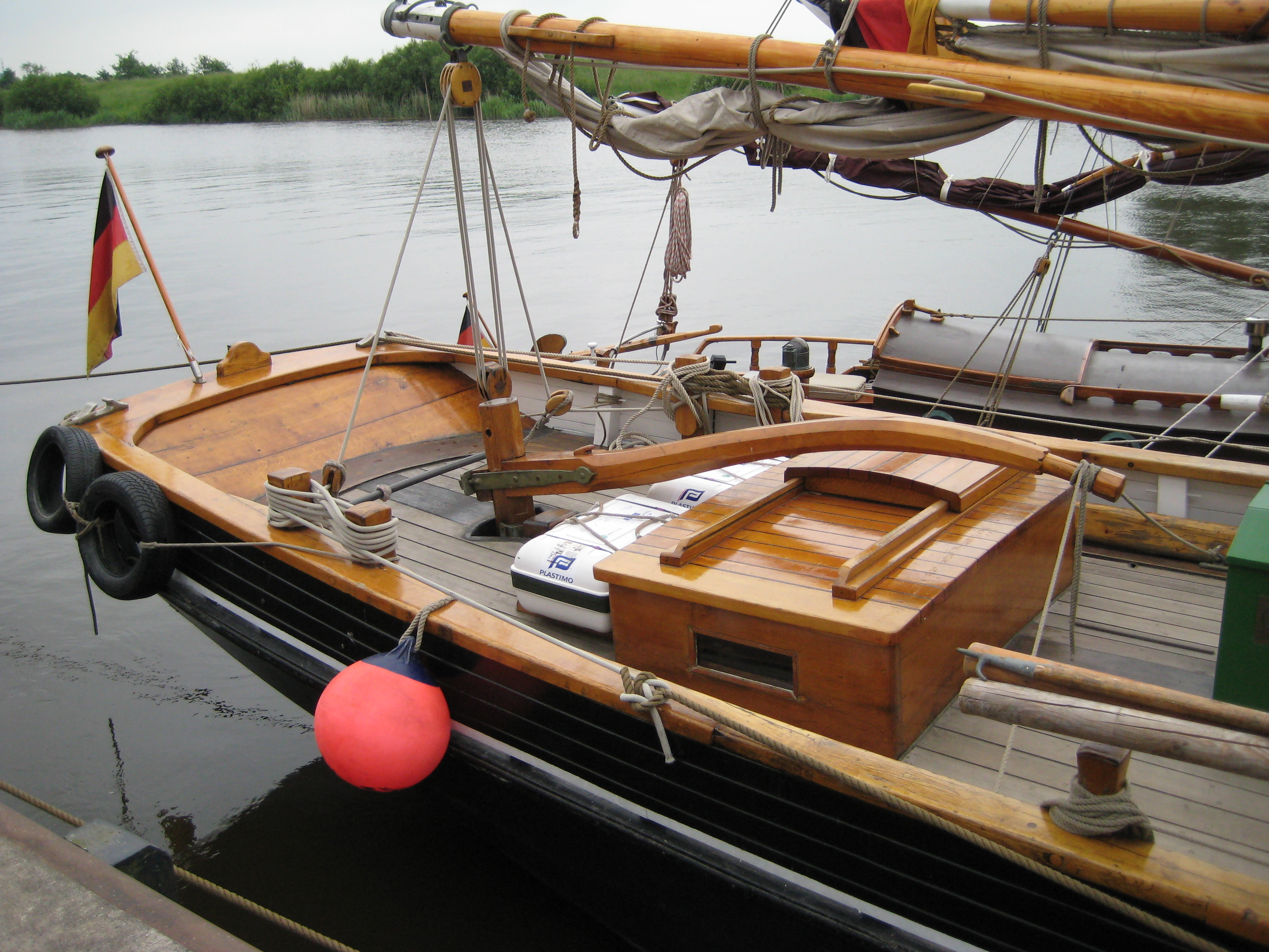 Das älteste fahrtüchtige Segelschiff Deutschlands, die Rigmor von Glueckstadt, Störschipperfest Itzehoe